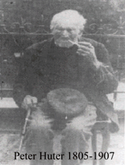 Peter Huter (+1907) aus Ensheim Saar, war zwei mal als bayerischer "Patriarch" bei der Hoffußwaschung in München